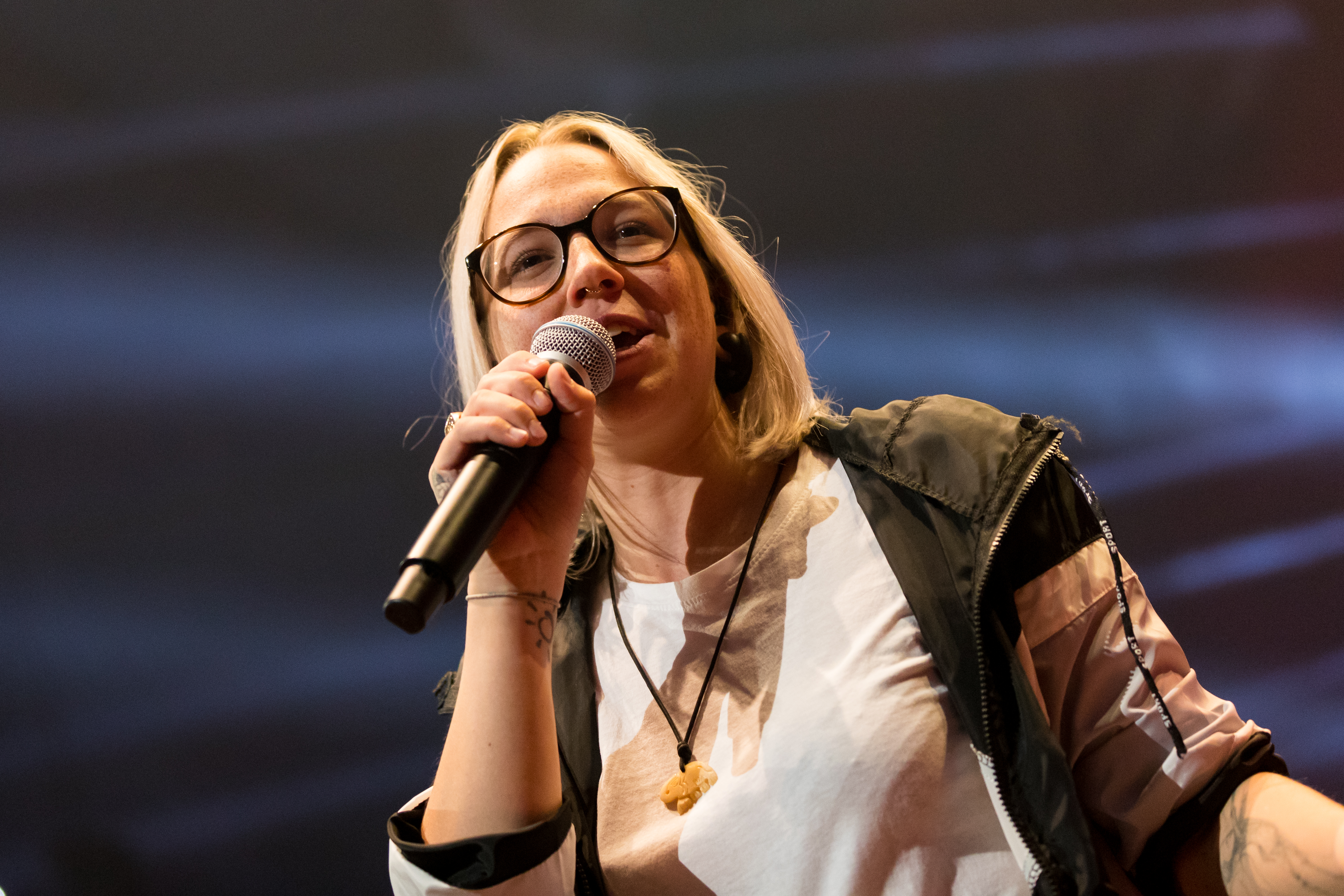 Stefanie Heinzmann during 30 Jahre Radio Regenbogen at SAP Arena, Mannheim, Mannheim, Germany on 2018-04-21, Photo: Sven Mandel